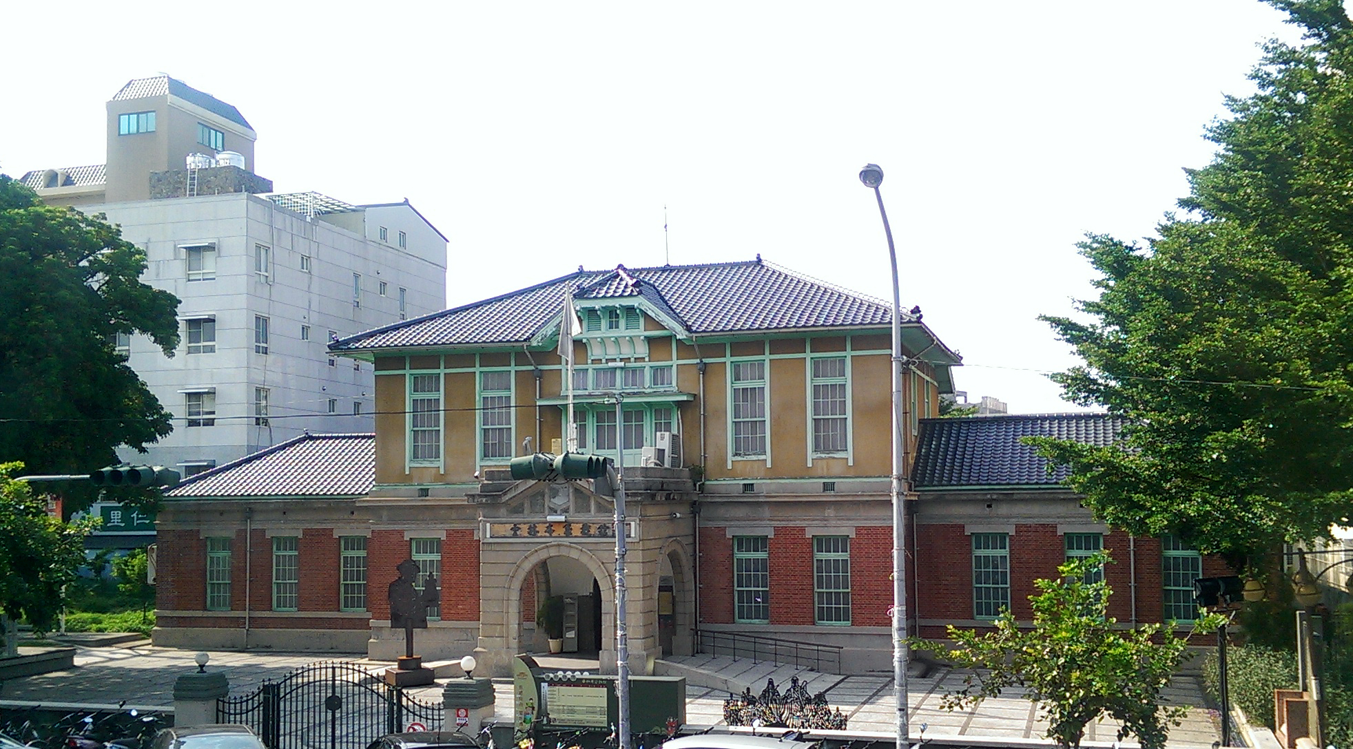 虎尾郡役所2014.8